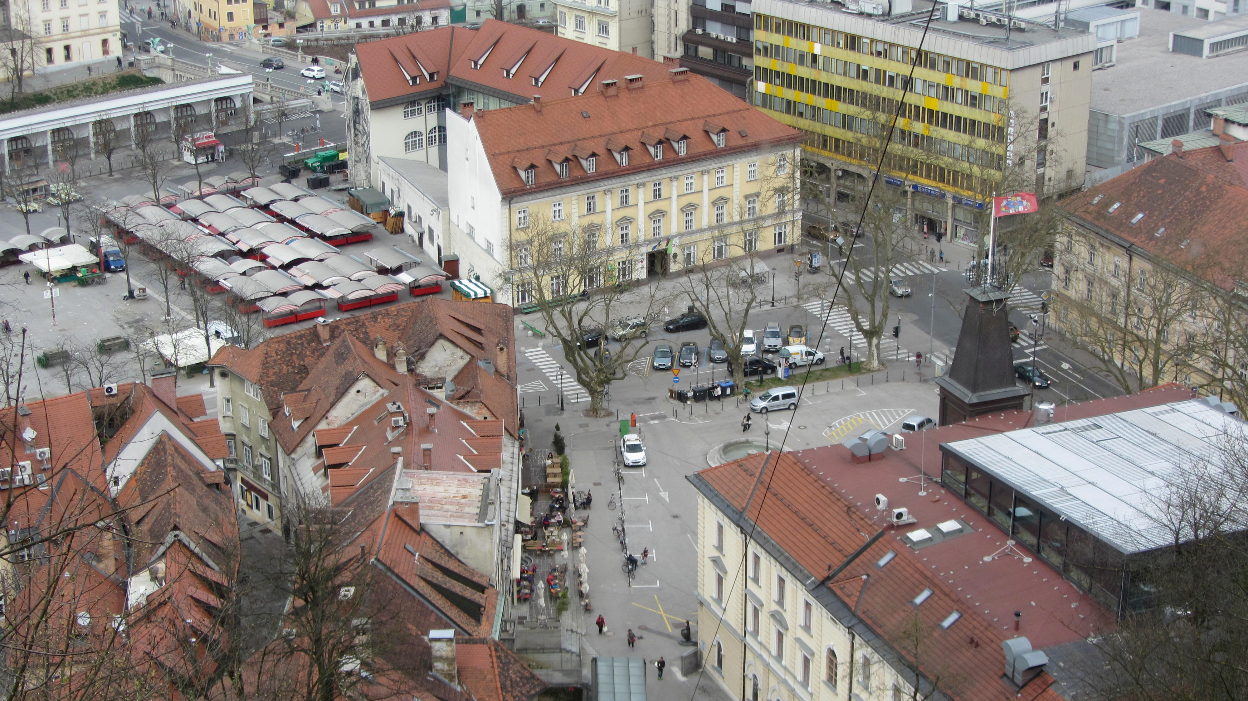 Slovenia, Ljubljana 056